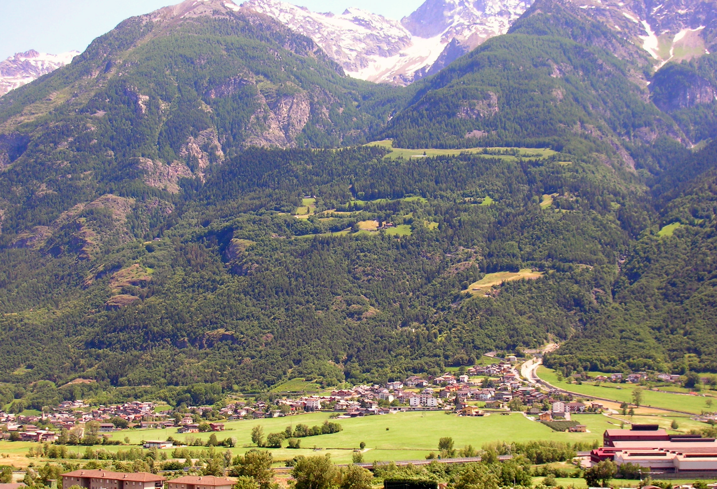 Panorama di Pollein, Valle d'Aosta, Italia.